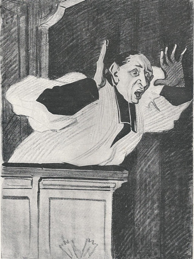 Illustration d'Hermann-Paul (1864-1940) pour le roman "L'Abbé Jules" d'Octave Mirbeau (1848-1917), Éditions Arthème Fayard, collection Modern-Bibliothèque, 1904.